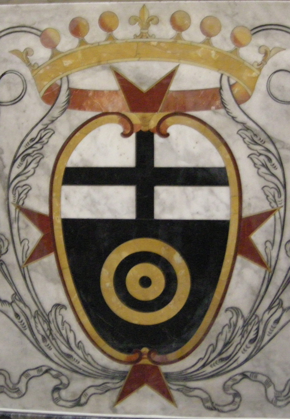 San paolino, cappela albizi, monumento a gerolamo albizi 03 2